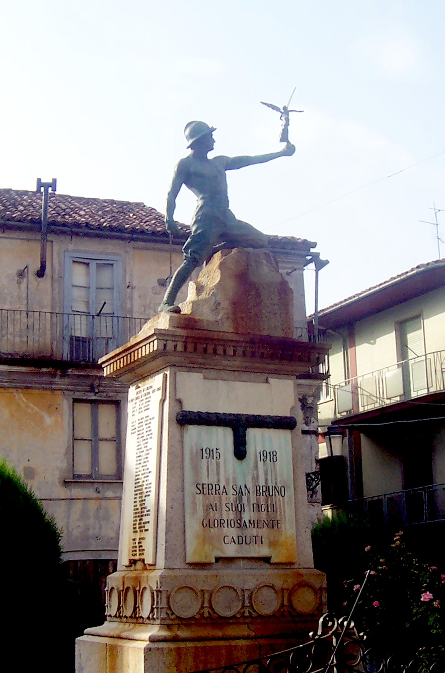 Concedo questa foto fatta da me a Wikipedia con GDFL